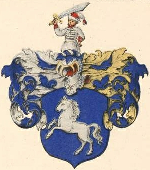 Reutzi suguvõsa aadlivapp